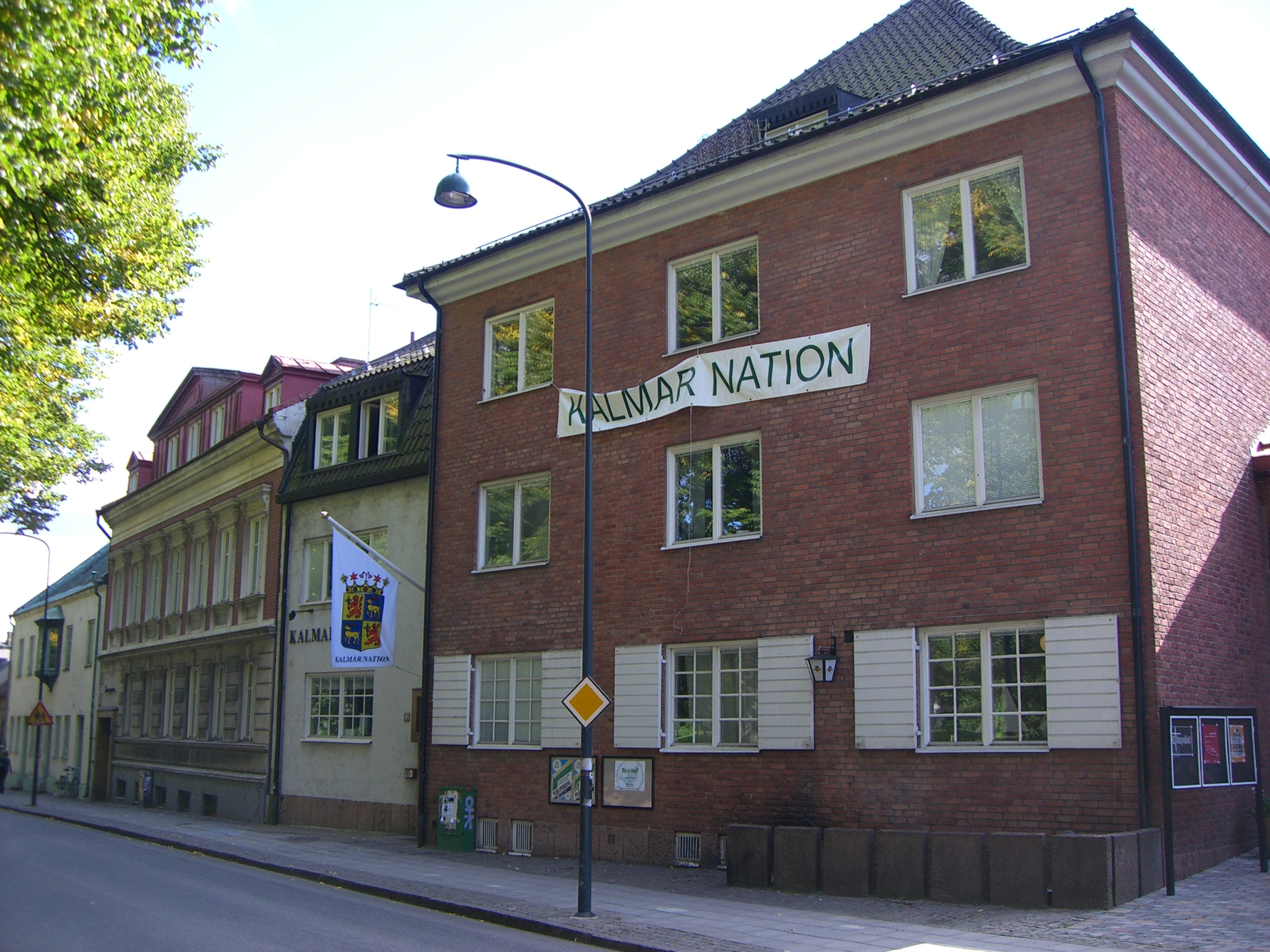 Kalmargården i Lund Bild tagen av Johan Östberg